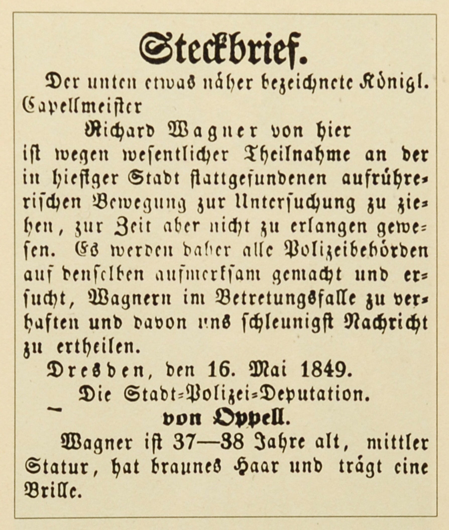 Richard Wagners Steckbrief von 1849: Poster warrant for arrest, issued 1849